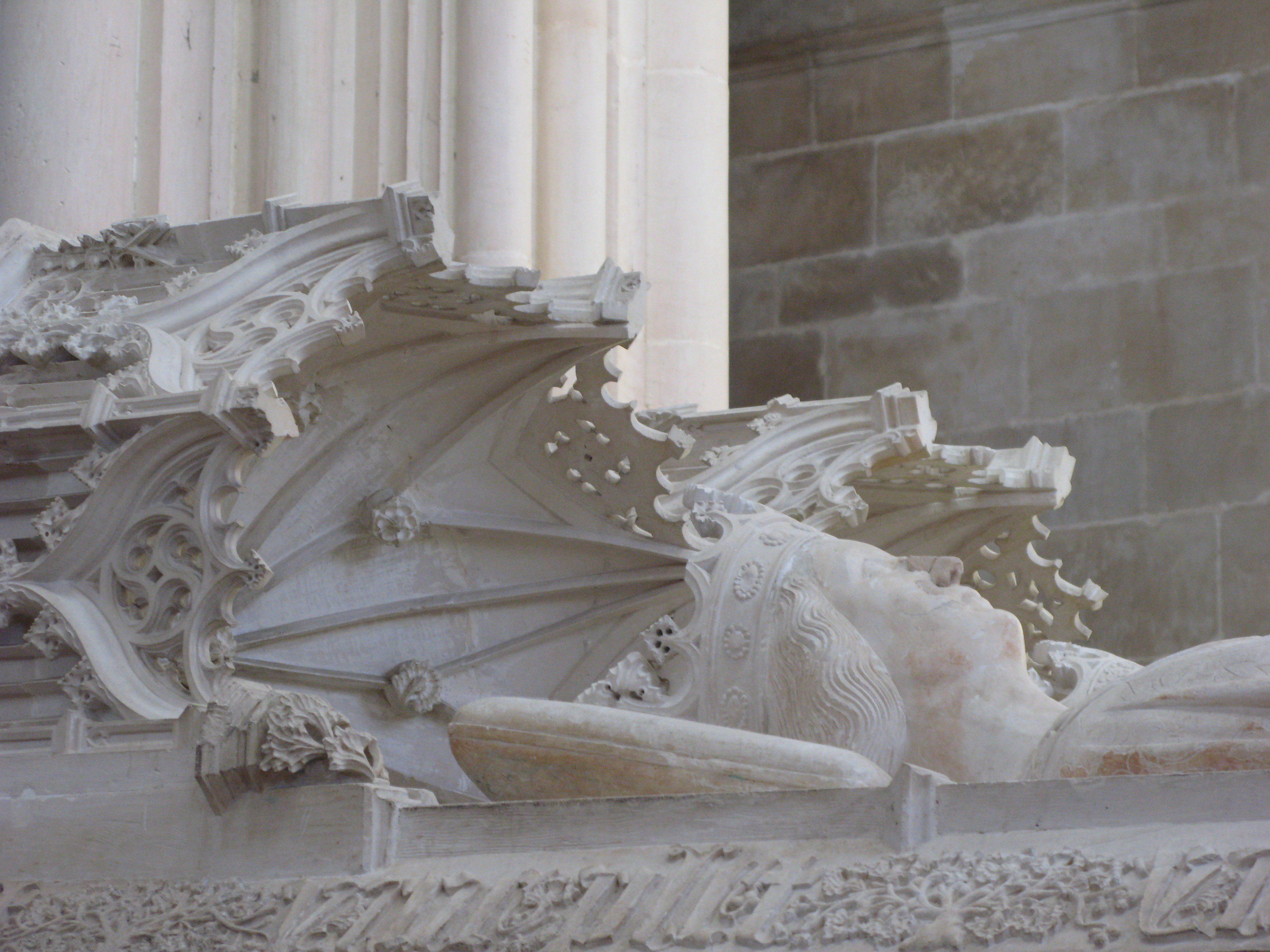 Batalha 2007, la tomba di Philippa di Lancaster, moglie di re Giovanni I